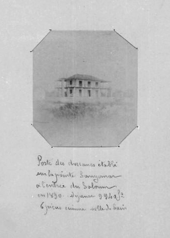 Poste des douanes établi sur la pointe Sangomar, à l'entrée du Saloum, en 1890 (in 15 phot. de la région du Saloum (Sénégal) en 1890)